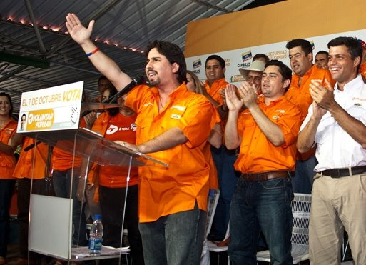 Freddy Guevara pronuncia discurso durante evento de activistas de Voluntad Popular.